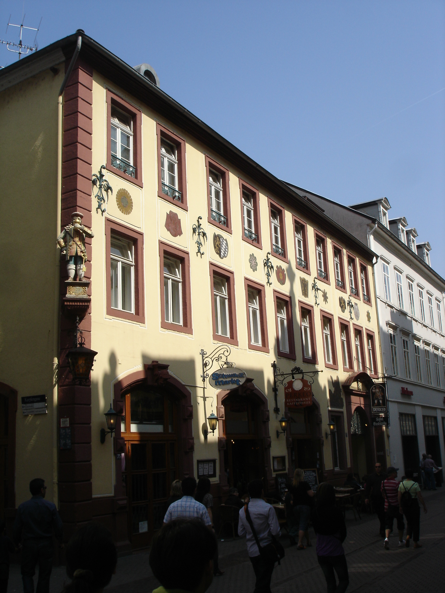 Ciudad de Heidelberg en Baden-Württemberg / City of Heidelberg in Baden-Württemberg Ciudad de Heidelberg en Baden-Württemberg / City of Heidelberg in Baden-Württemberg